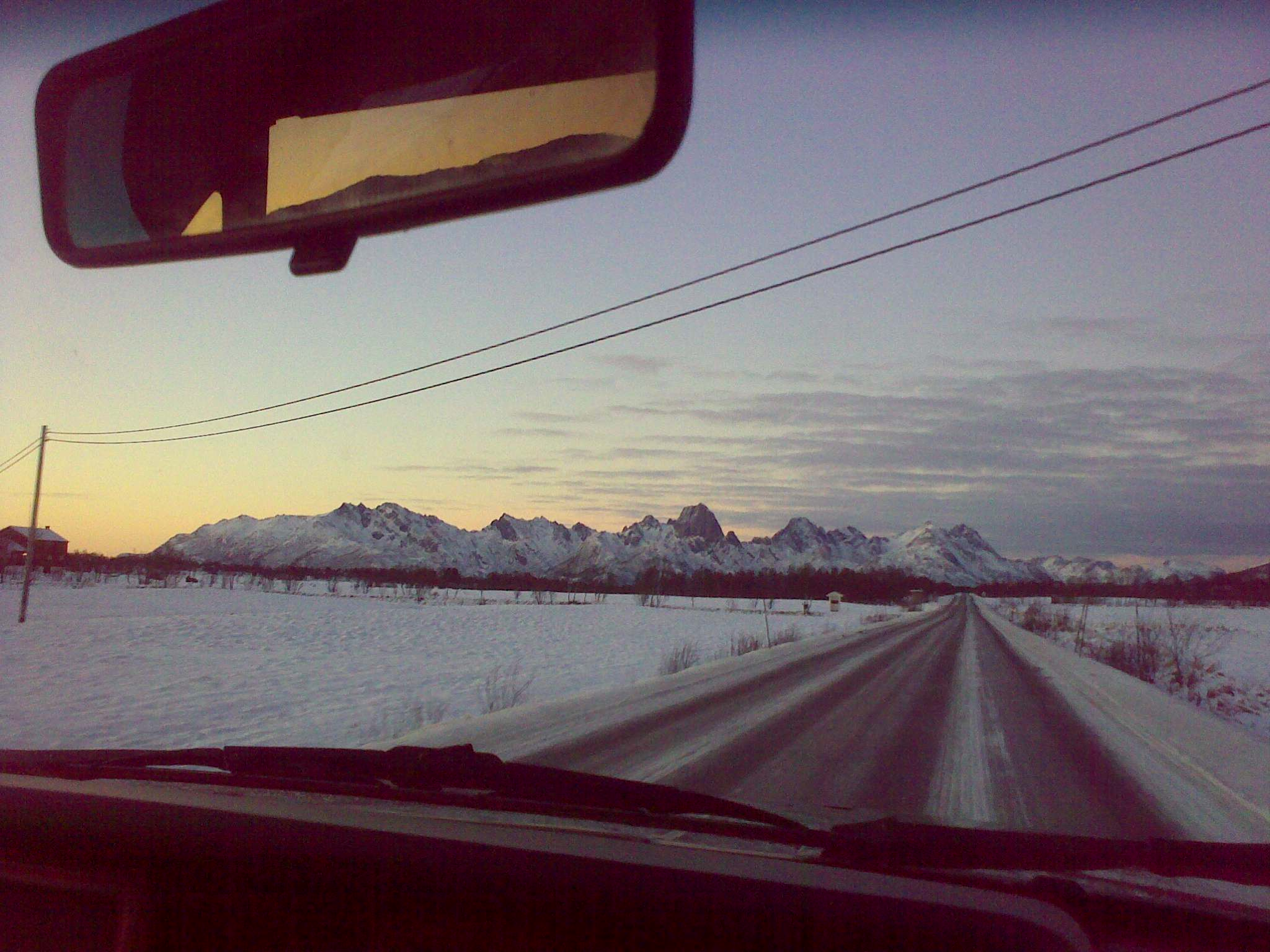 Vikeidet. På vei fra Sortland til Bø lørdag 5. desember. En moderne roadmovie i mørketidens rike, med aj så vakkert lys.